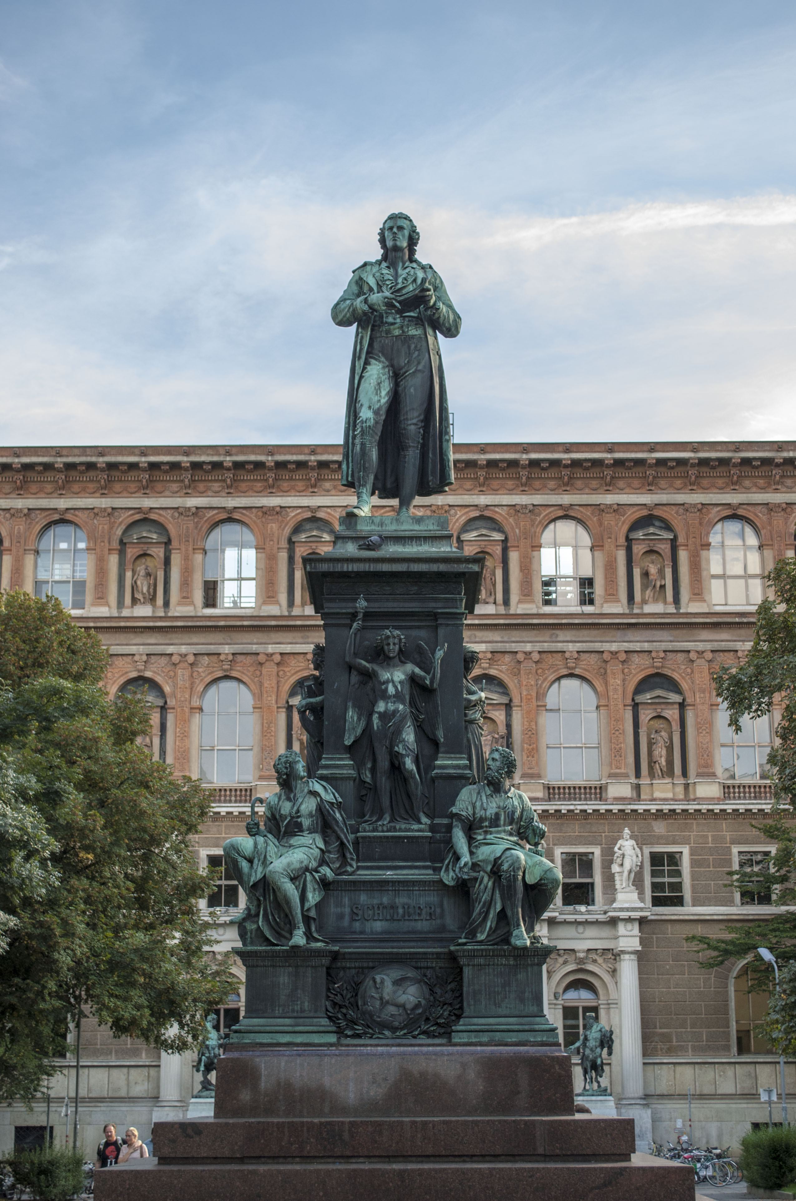 Friedrich von Schiller-Denkmal